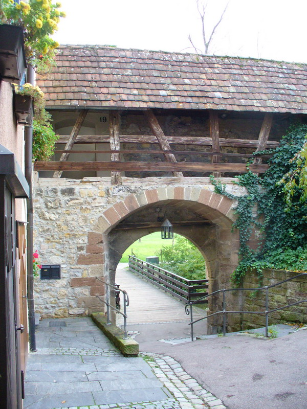 Waiblingen, Baedertoerle